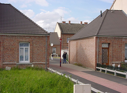 Dispositif de démonstration de l'association ADOPTA ; association Loi 1901 réunissant la ville de Douai, le Conseil régional du Nord Pas-de-Calais et l'Agence de l'eau Artois picardie, dédiée à l'expérimentation et à la prompotion de techniques alternatives de lutte contre les inondations et le ruissellement urbain. Dans un coron réhabilité, autrefois humide et périodiquement inondé, un réseau de chaussée et chemins, draine efficacement l'eau de pluie et tamponne les pics pluvieux, sans inondations des caves voisines. [1]